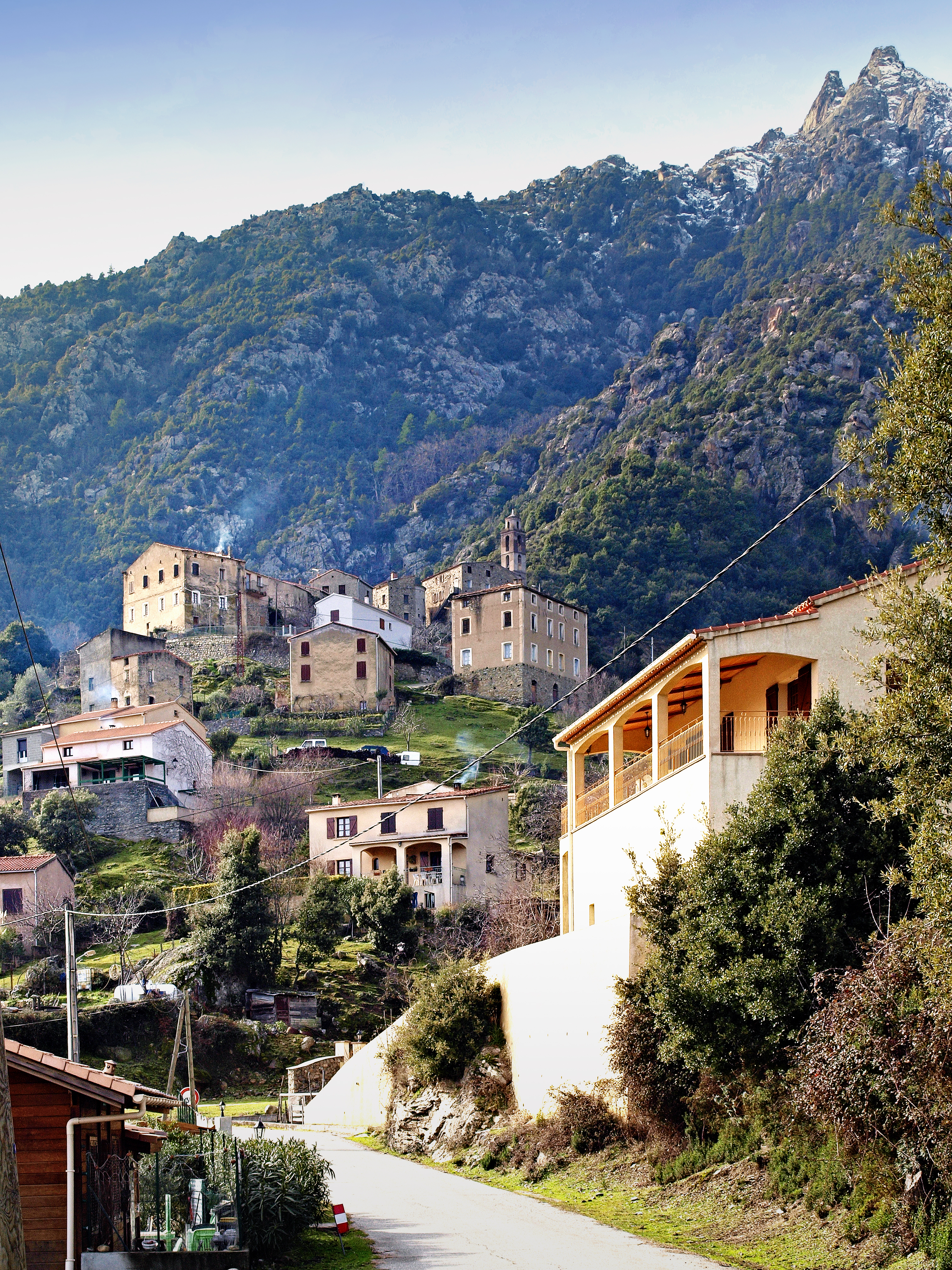 Popolasca (Corsica) - Le village